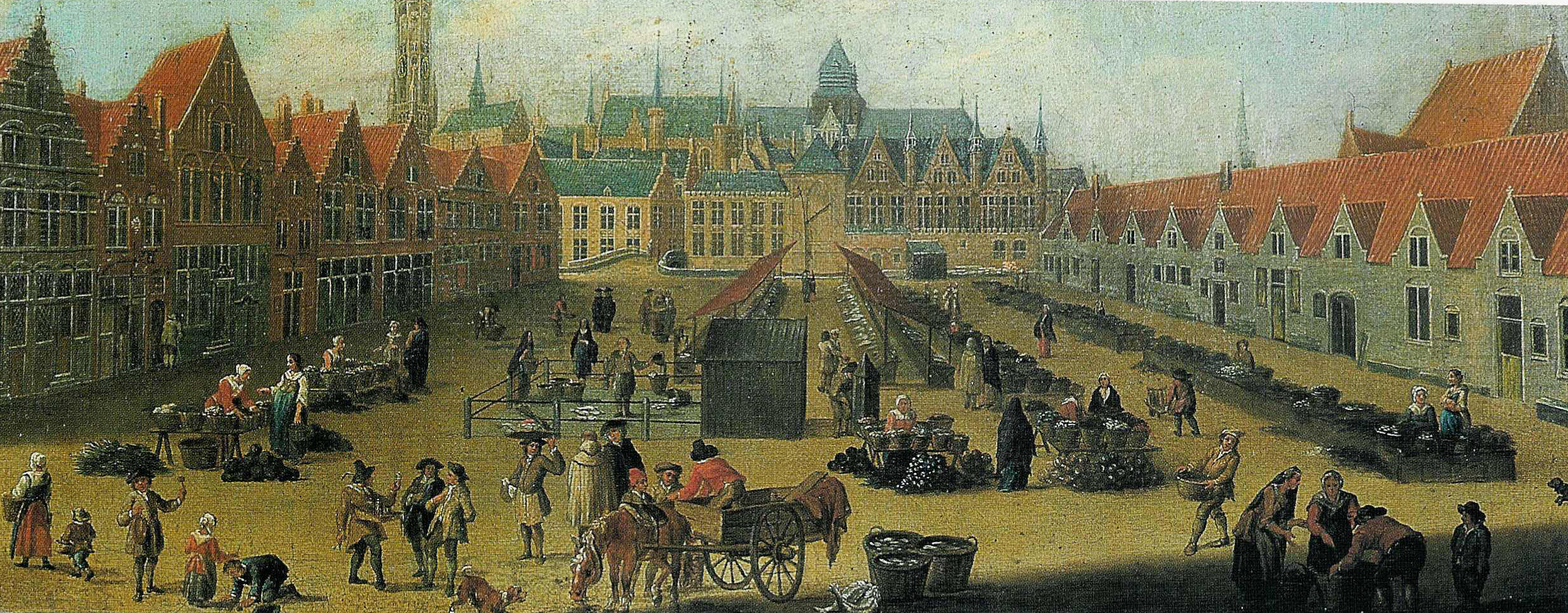 Braamberg, nu vismarkt. Toen nog niet overdekt. Rechts het Oostvleeshuis, achteraan midden ziet men nog de nu afgebroken Sint-Donaaskathedraal